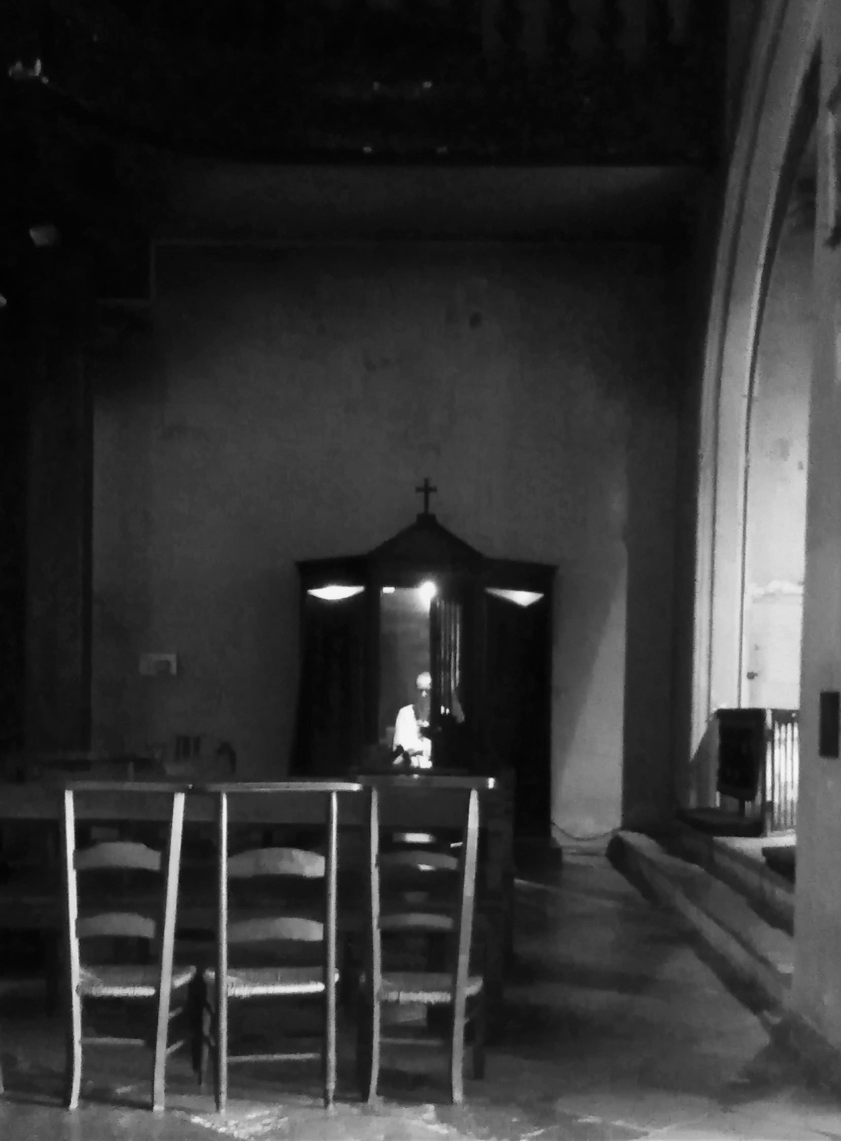 Confession - N&B by JPC